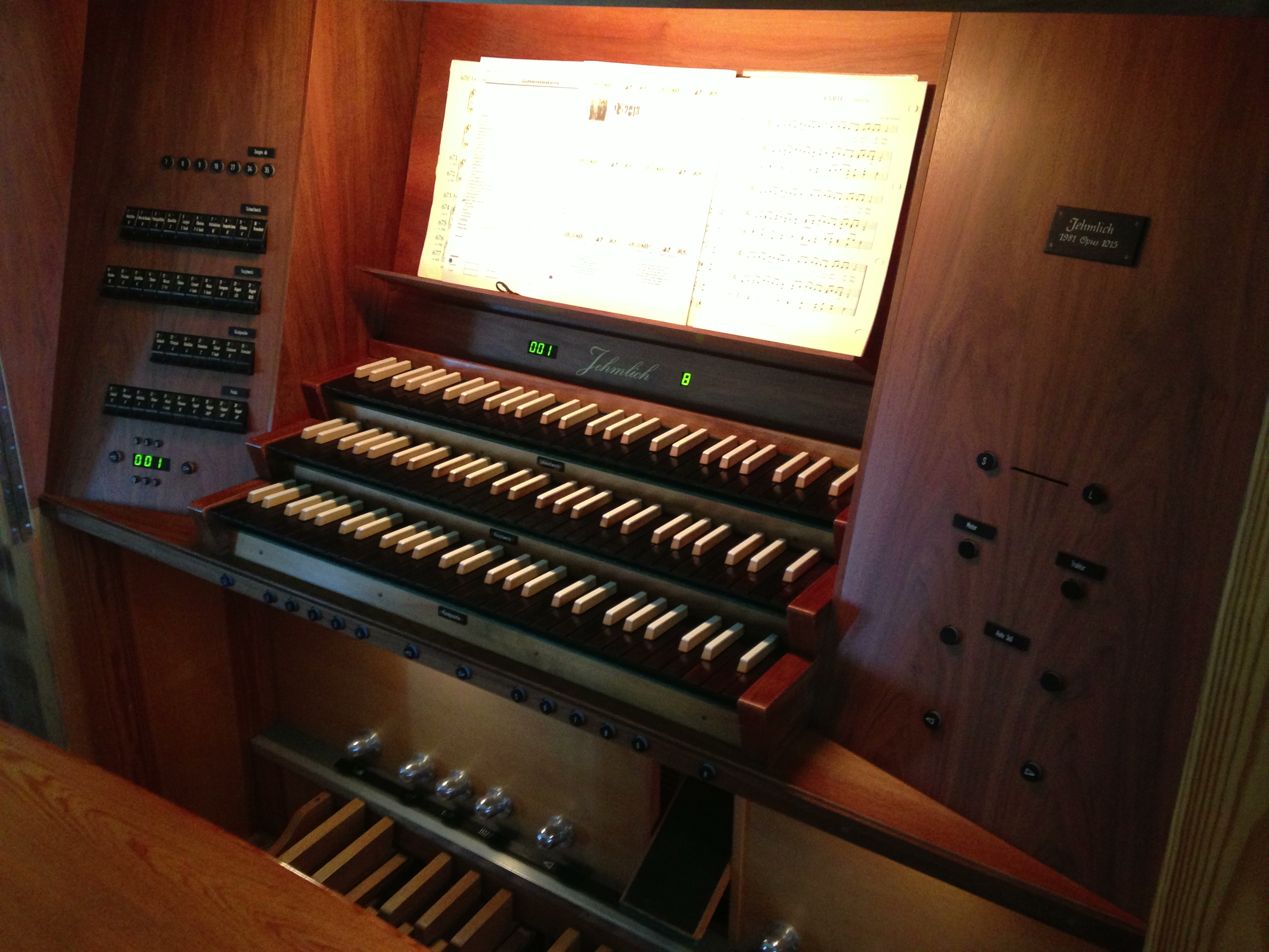 Spelepulten til orgelet i Manger kyrkje